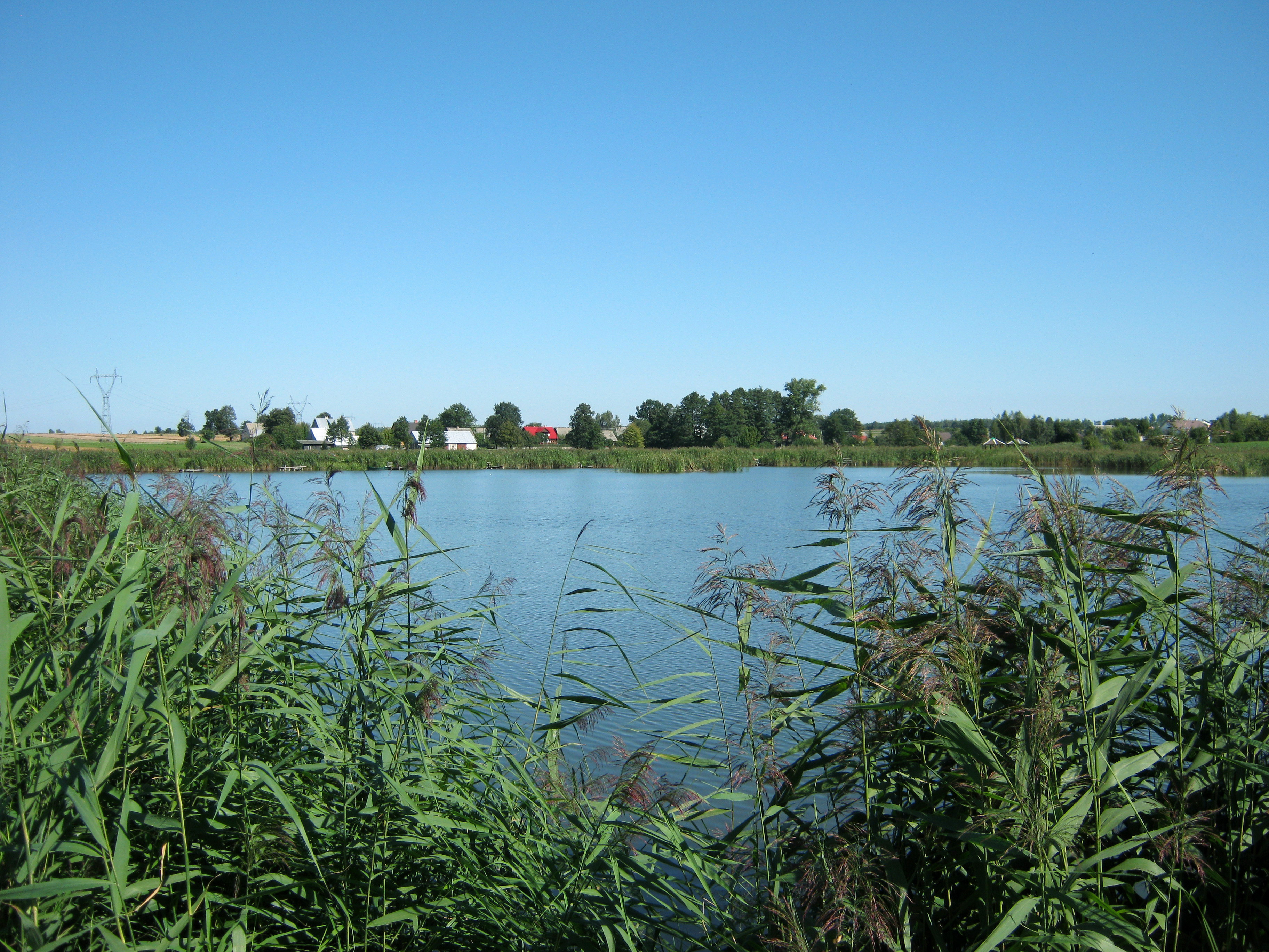 Staw w Grabowie